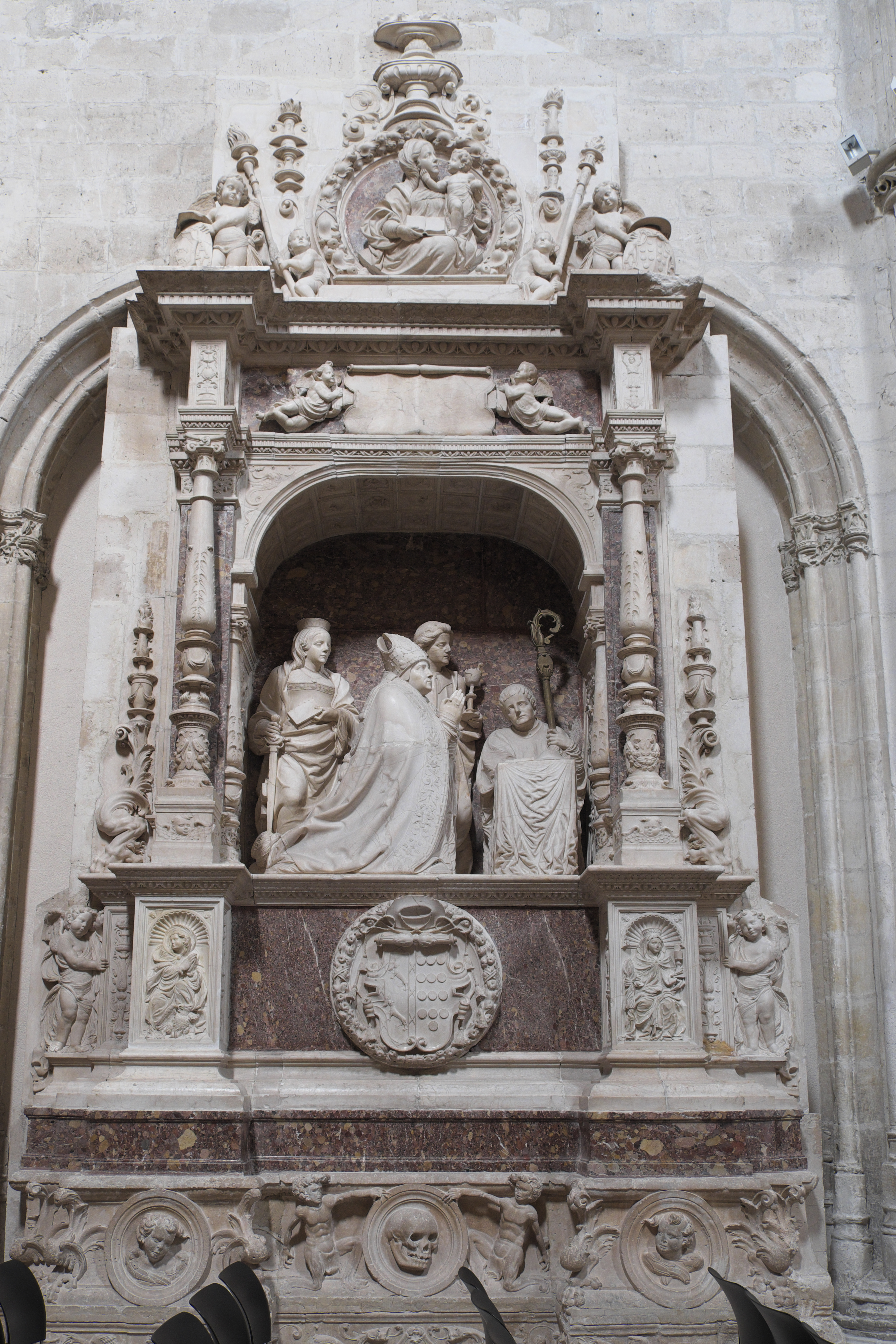 Kapelle des Colegio de San Gregorio, heute Museo Nacional de Escultura, in Valladolid (Kastilien und León/Spanien), Alabaster-Grabmal des Bischofs Diego de Avellaneda, aus dem Kloster San Juan Evangelista y Santa Catalina in Espeja de San Marcelino, von Felipe Bigarny und Enrique de Maestrique, fertiggestellt von Juan de Gómez, zwischen 1536 und 1566 geschaffen